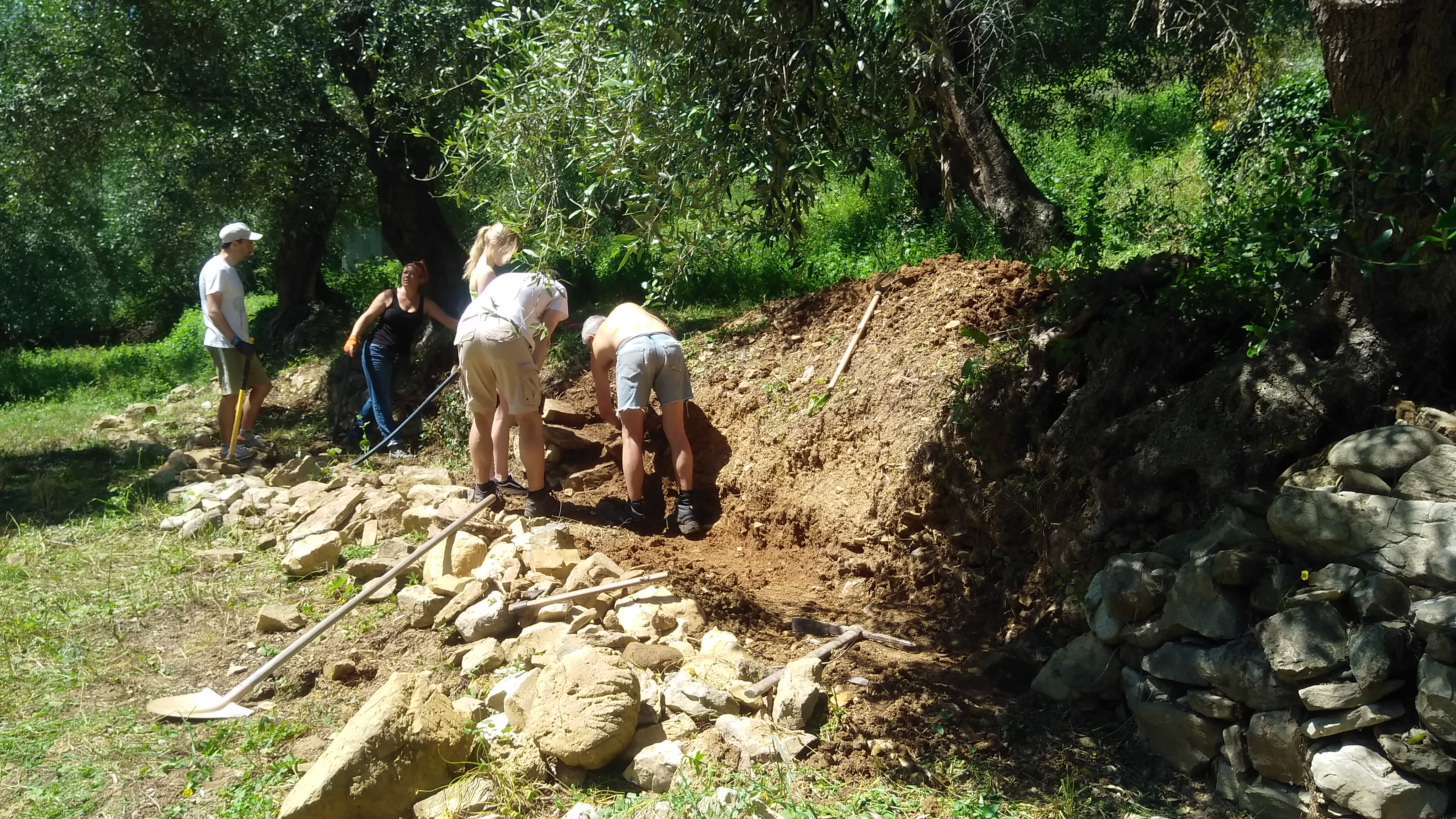 Monte Grammondo - Torrente Bevera (Q47502132)